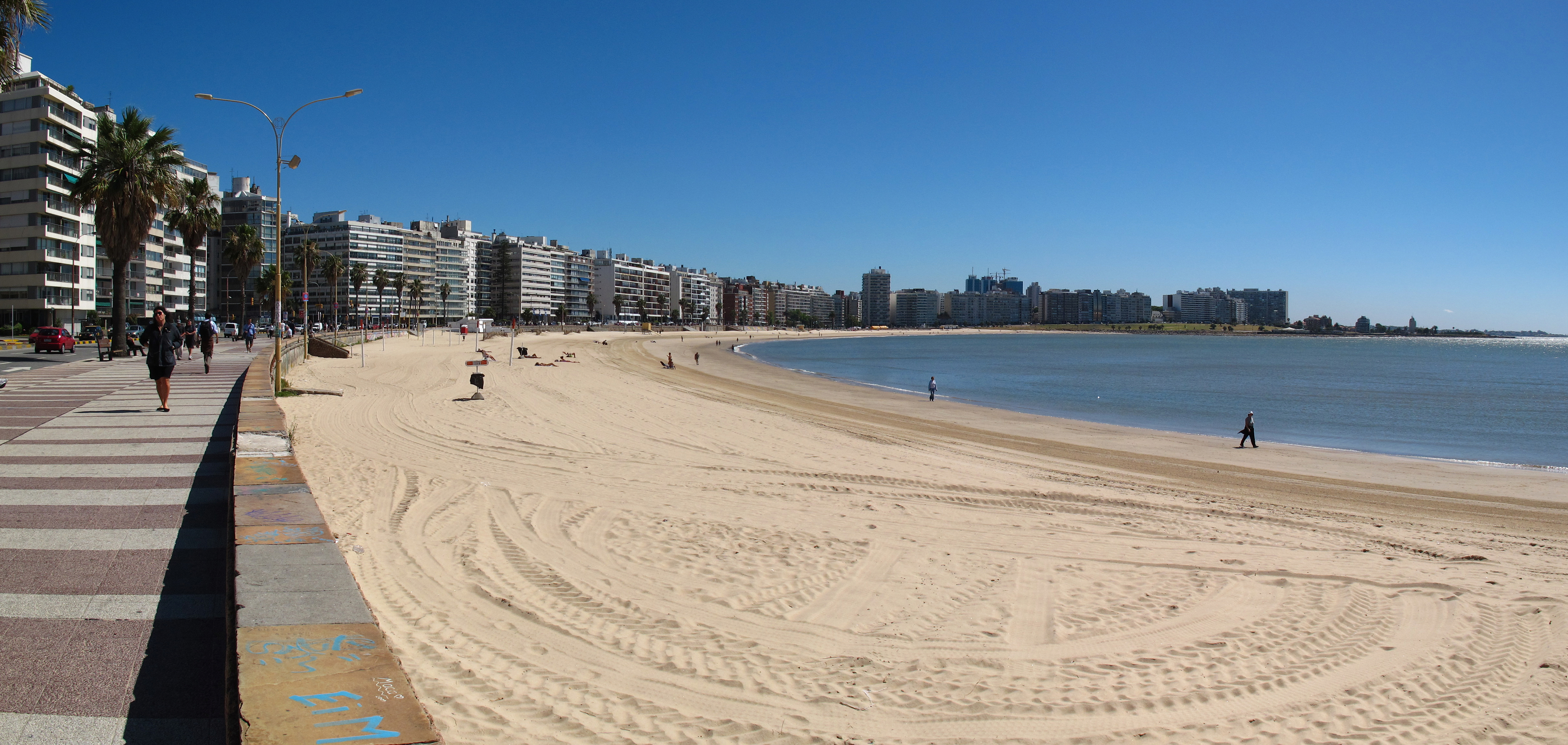 Panorámica de la playa de Pocitos en Montevideo (Uruguay)